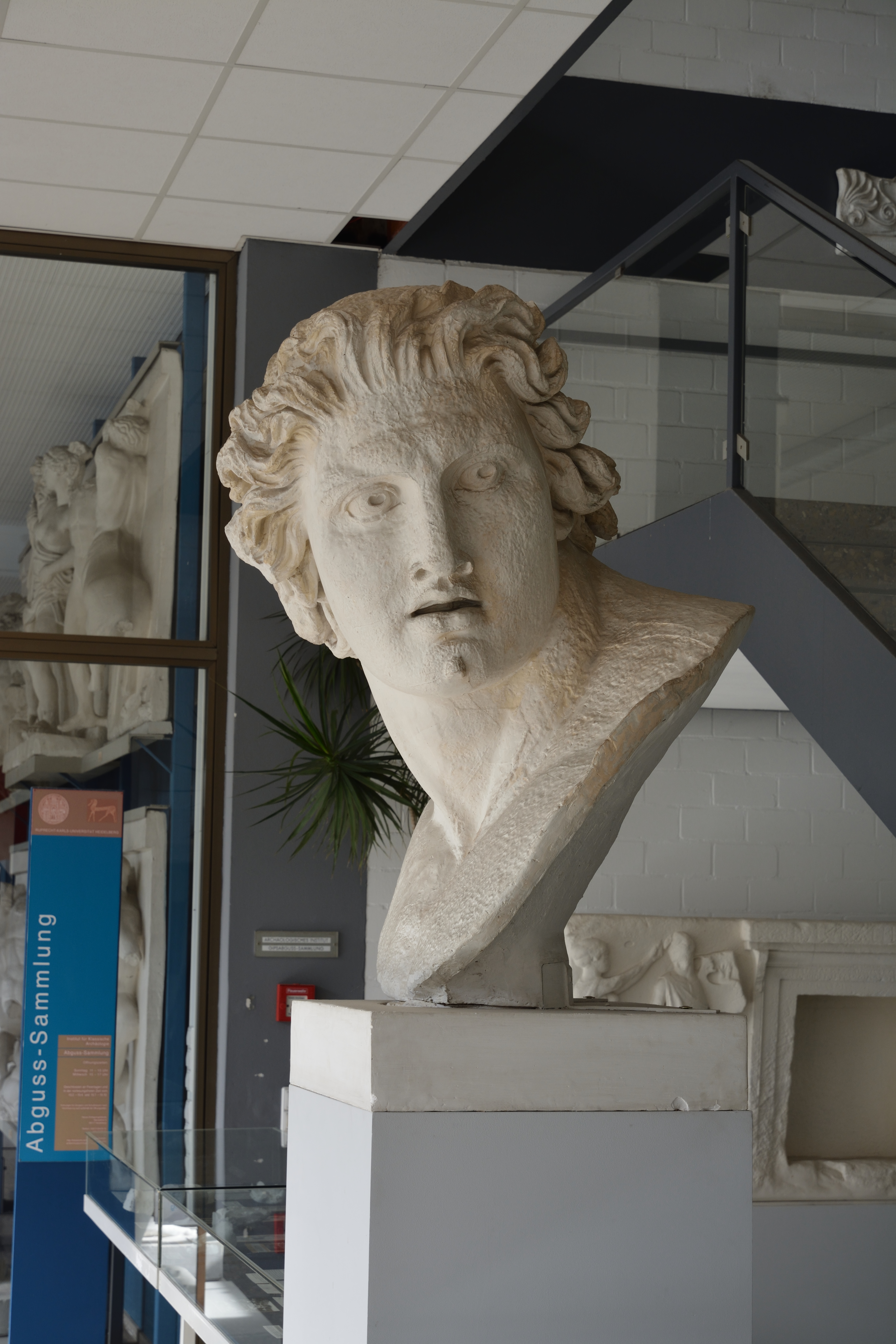 Impressionen einer Veranstaltung: GLAM-on-Tour: Antikenmuseum der Universität Heidelberg 2016